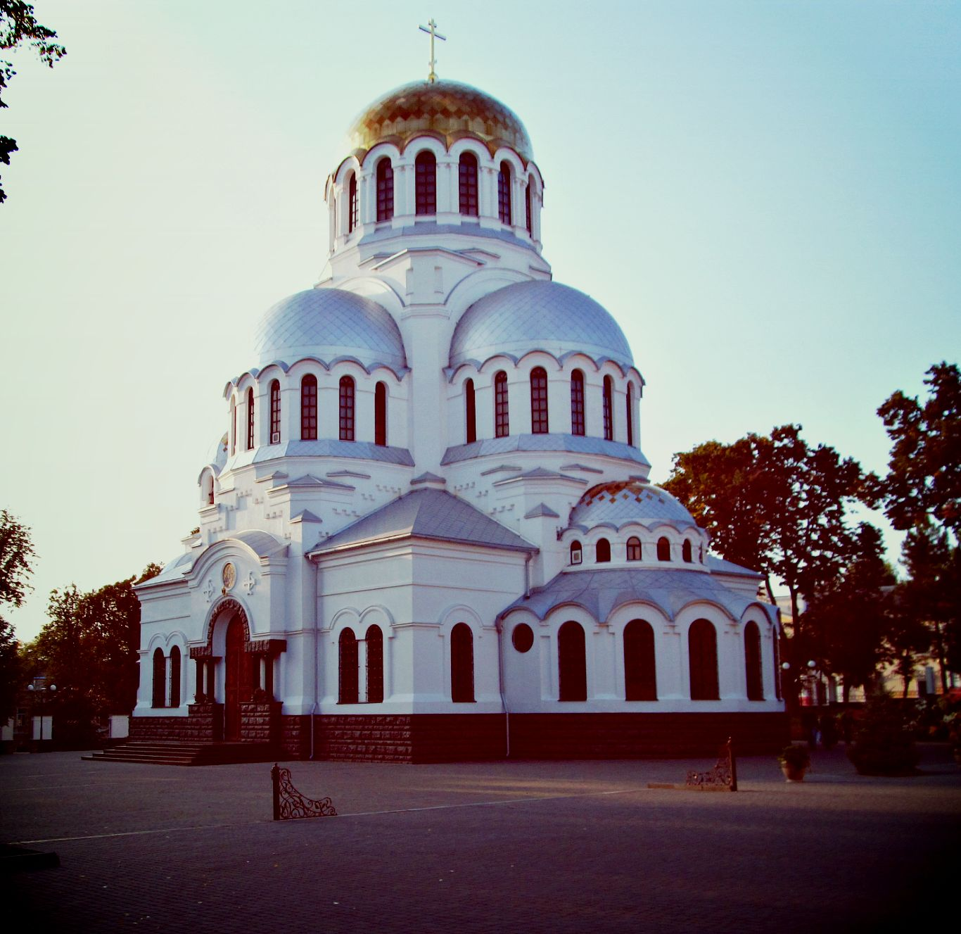 Церква святого Олександра Невського, Кам'янець-Подільський. Не має статусу пам'ятки